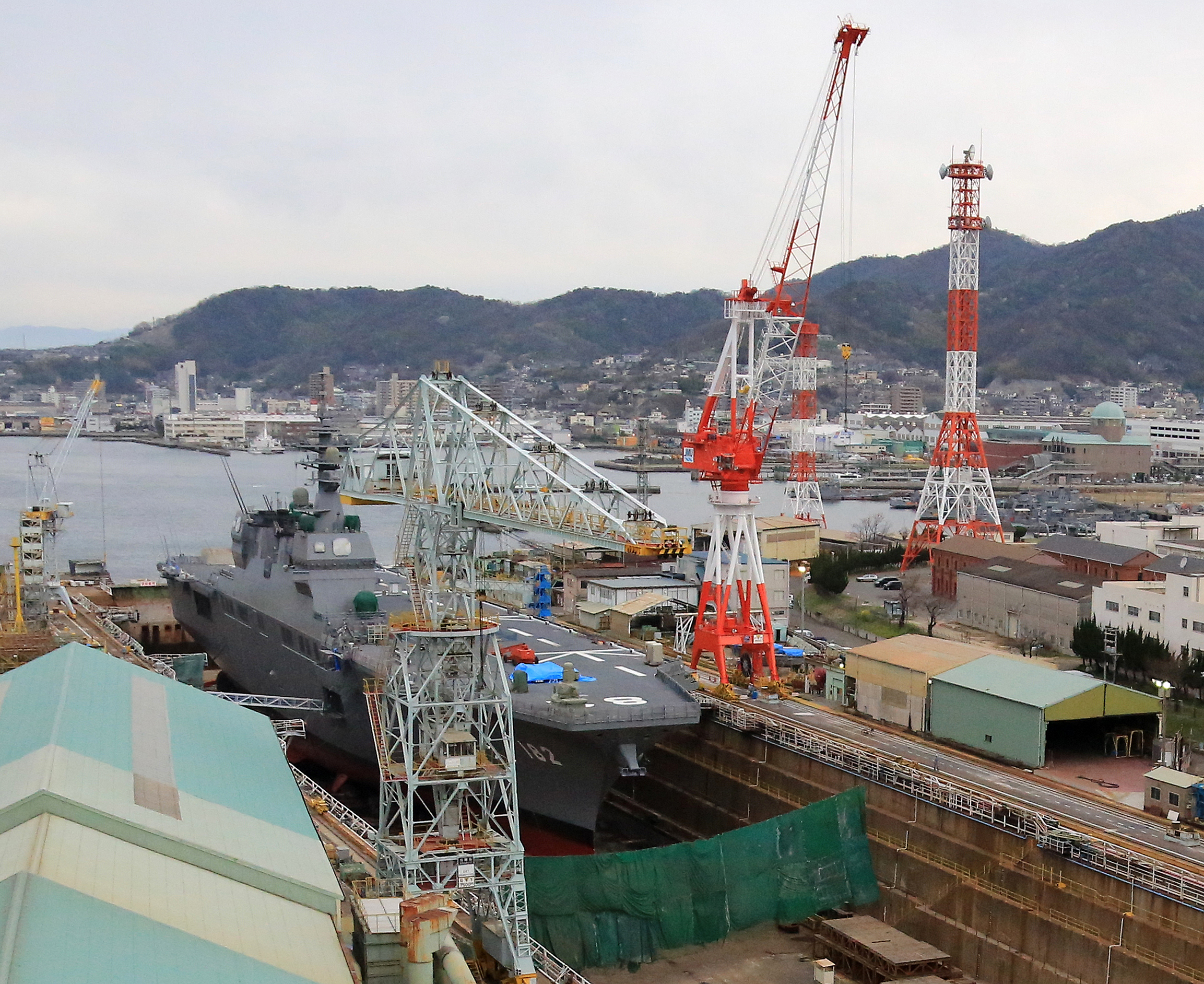 ジャパン・マリンユナイテッド呉工場・第4ドックで定期修繕中の護衛艦いせ。